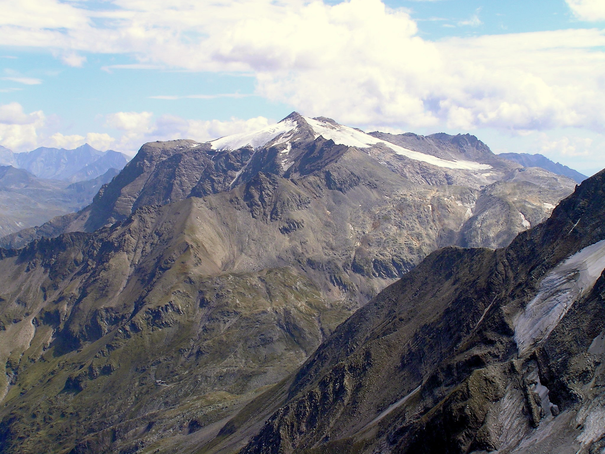 Das Schareck vom Anstieg zum Hocharn aus gesehen